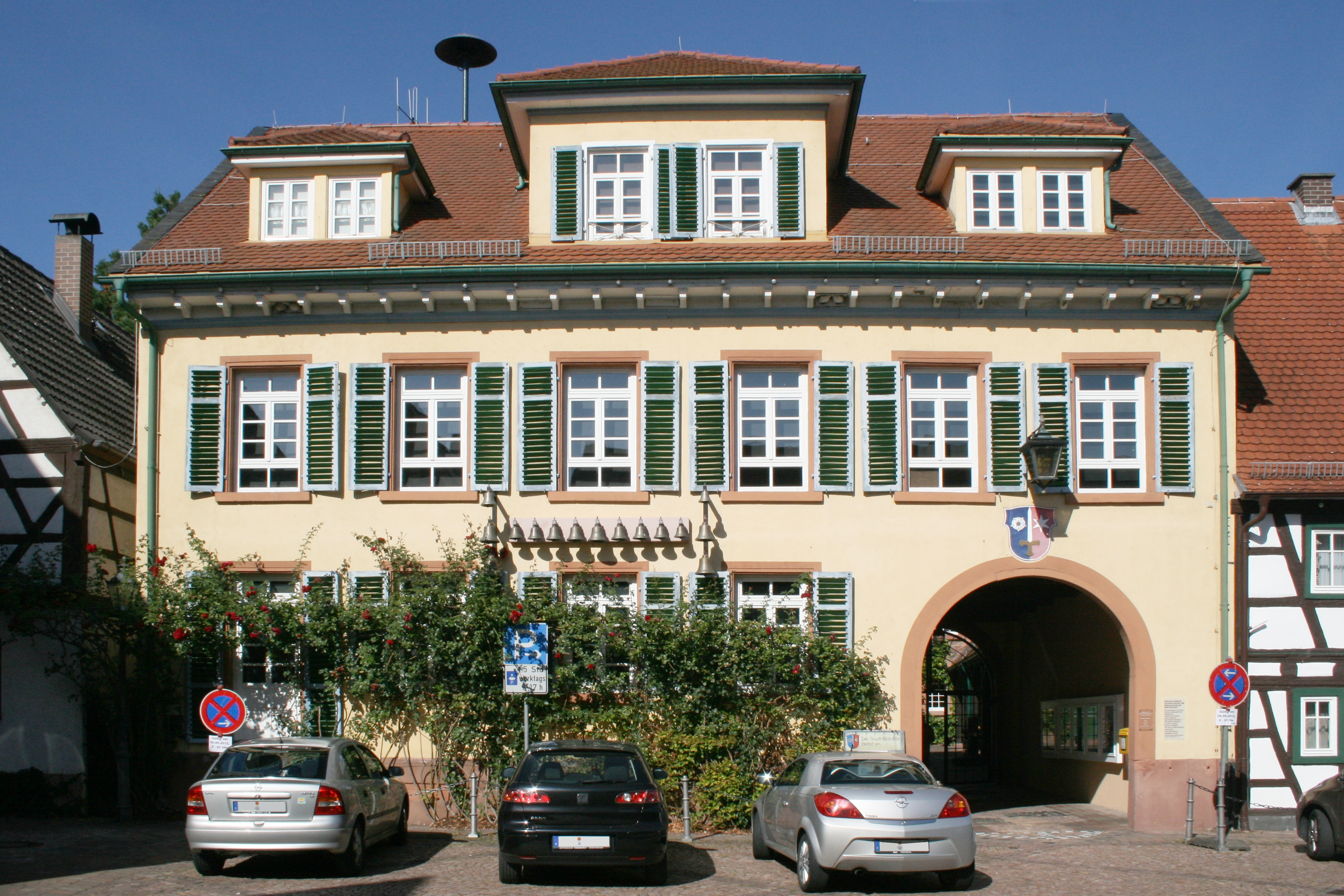 Marktstraße 6, ehemaliges Kreisamtsgebäude in Breuberg-Neustadt.